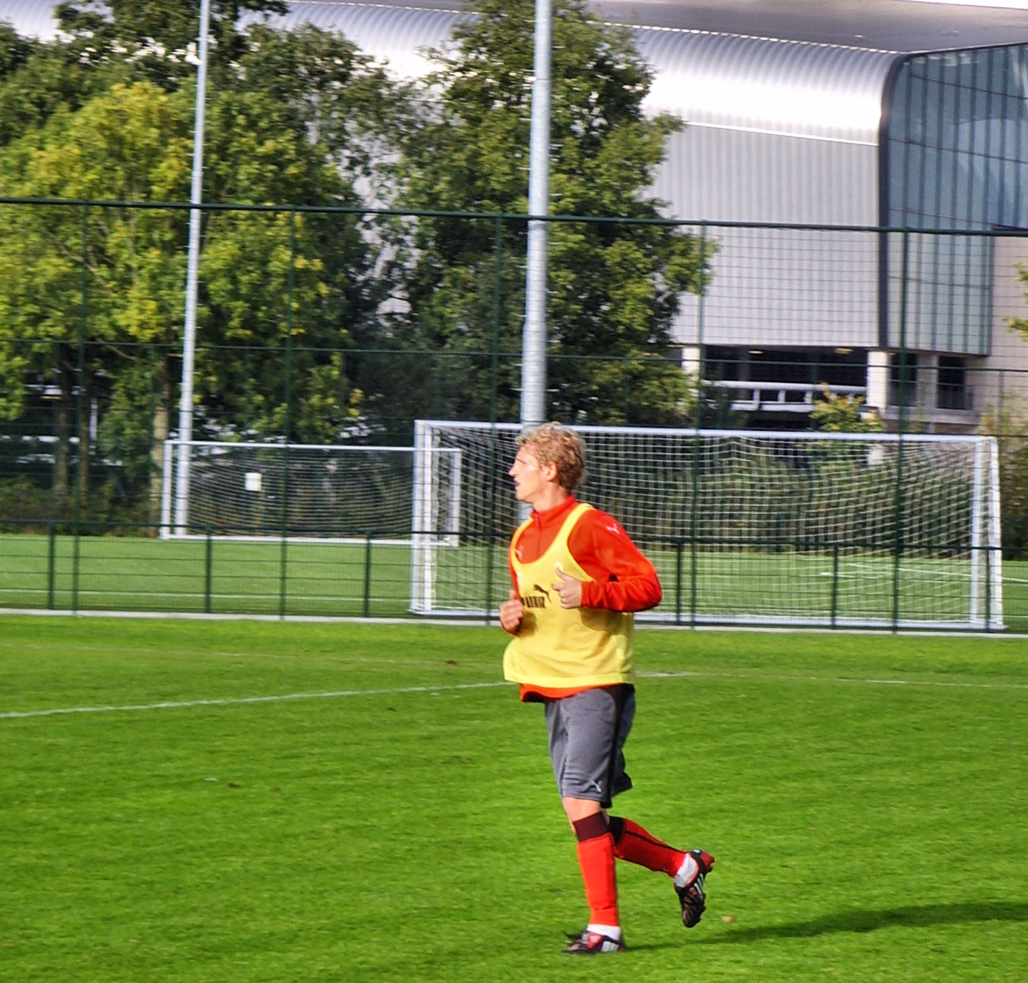 Mihai Neşu, Roemeens voetballer, tijdens een training van FC Utrecht.